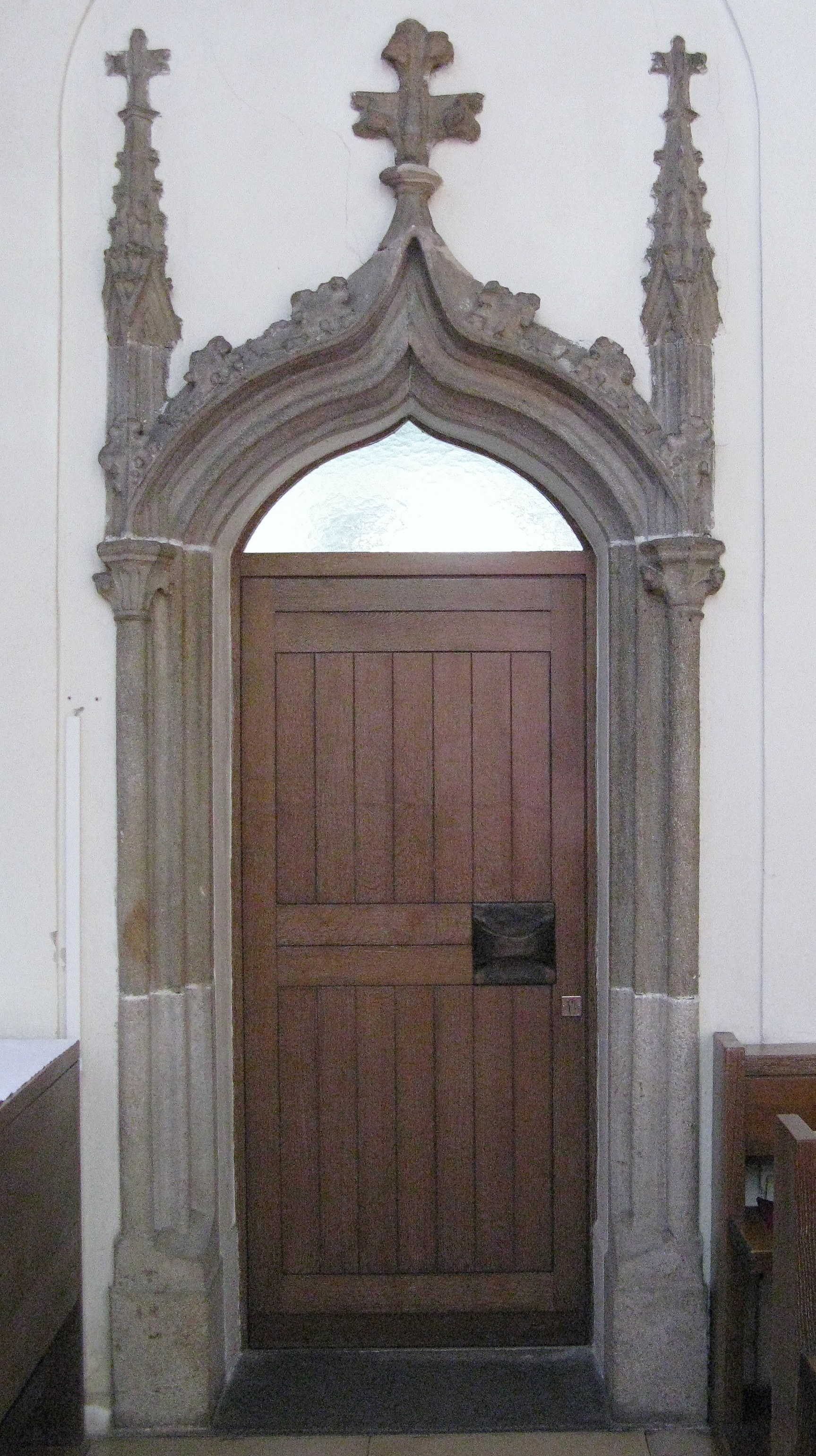 Gotisches Sakristeiportal in der Stadtpfarrkirche Perg